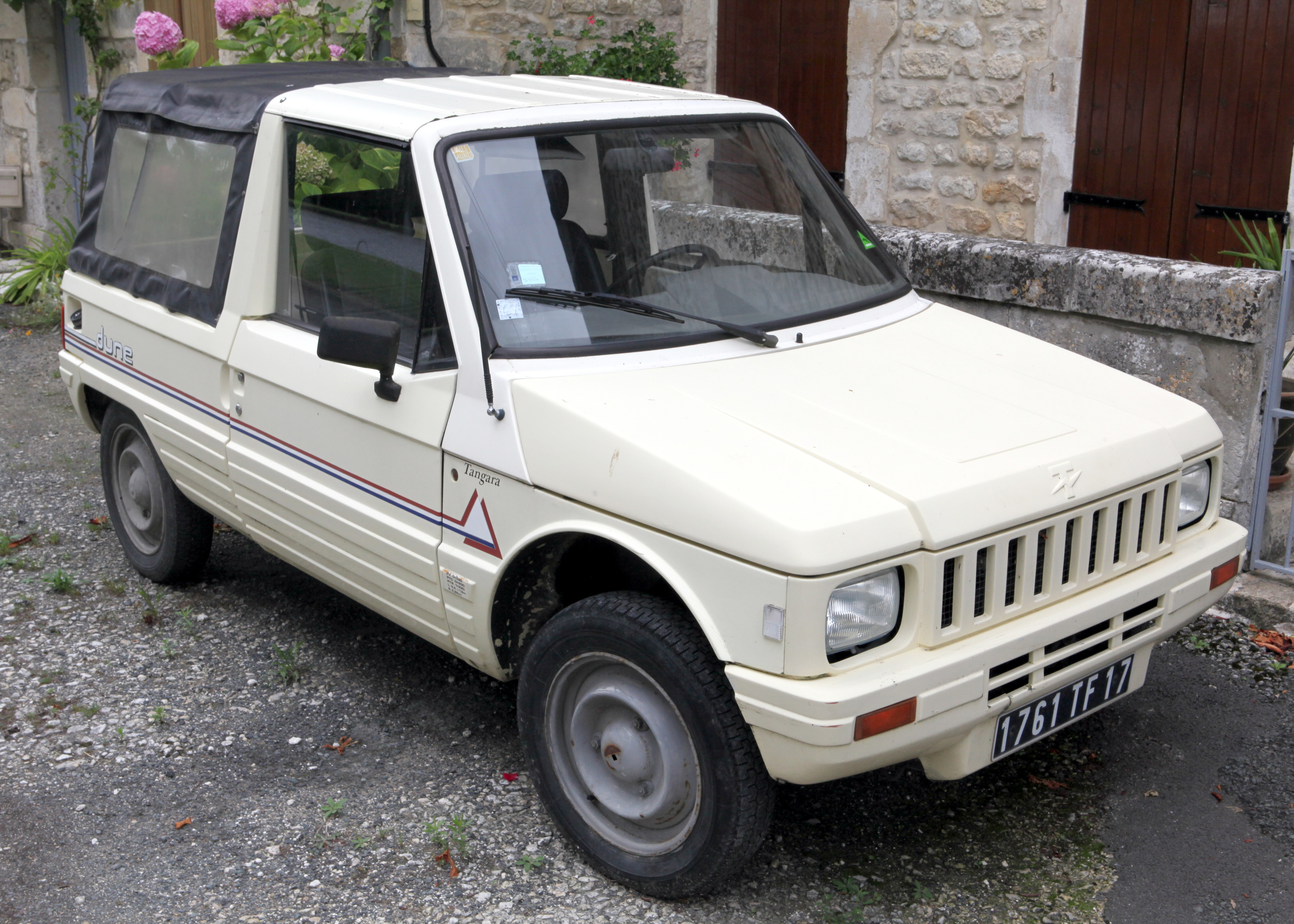 Citroen Teilhol Tangara